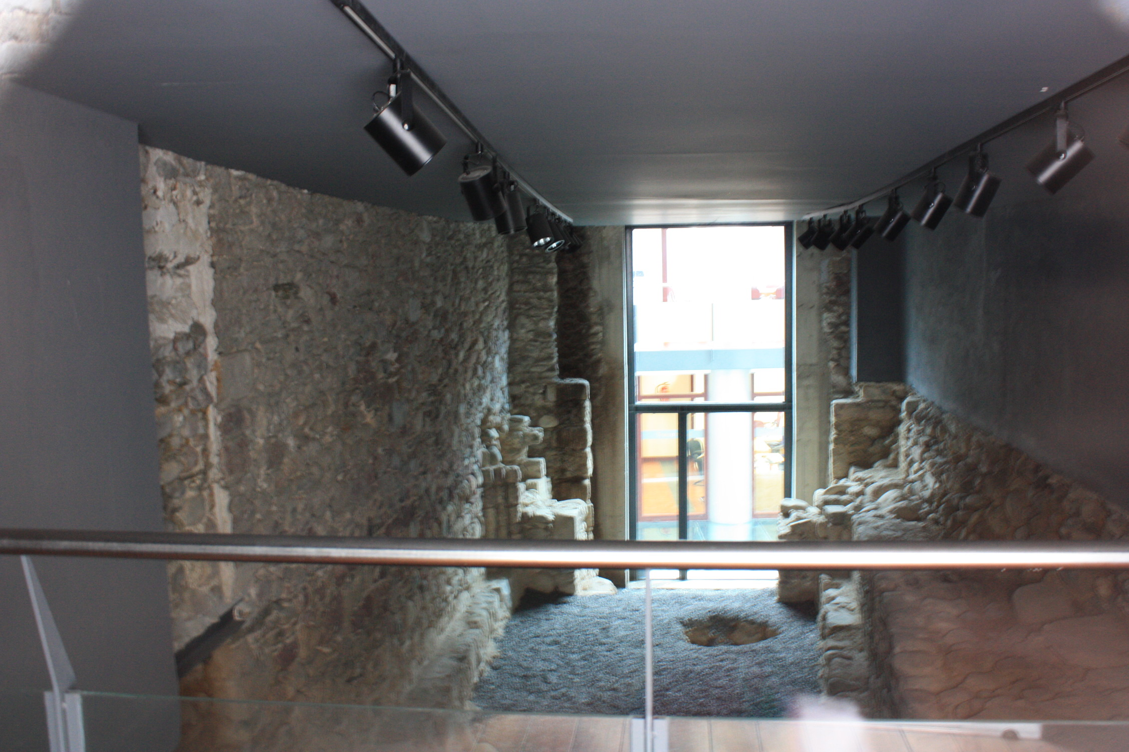 Església de Santa Eulàlia, a l'Ajuntament de la Seu d'Urgell on es troben les restes d'una antiga església dedicada a Sta. Eulàlia del s. XI, capella de l'antic hospital s. XV, muralla s. XIII-XV, torre s. XV i murs d'una vil·la romana, probablment s. III-IV.